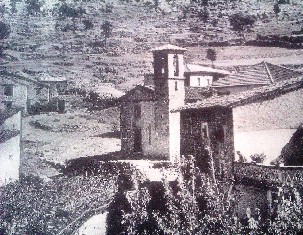 foto storica Castelluccio RIETI